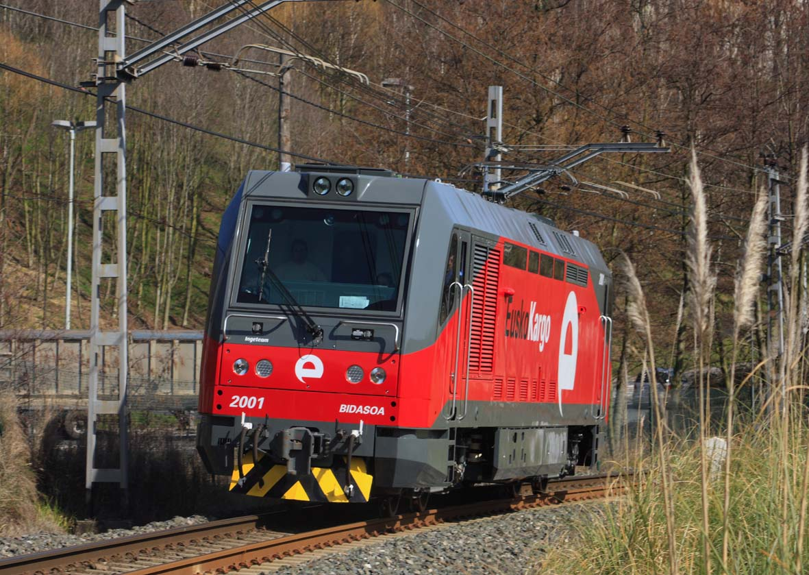 La locomotora Euskotren TD 2001 BB "Bidasoa" de EuskoKargo pasa como un tiro ante la cámara durante las pruebas que efectuó el pasado 10 de marzo en el ramal Lutxana-Sondika. Asua-Erandio.